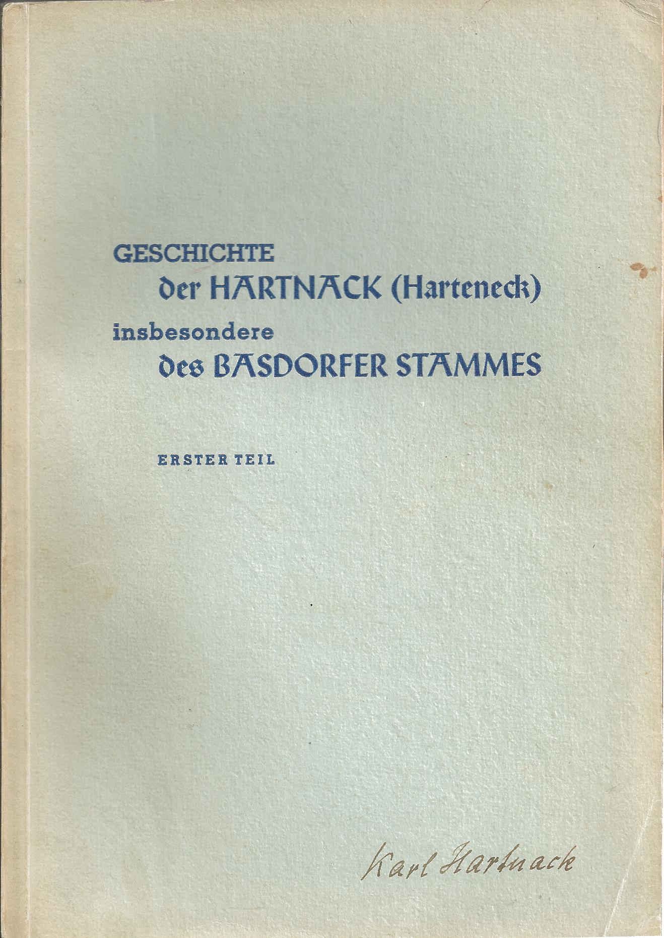 Dazu gehört ein Zweiter Umschlag mit Stammtafeln mit Stand 1941